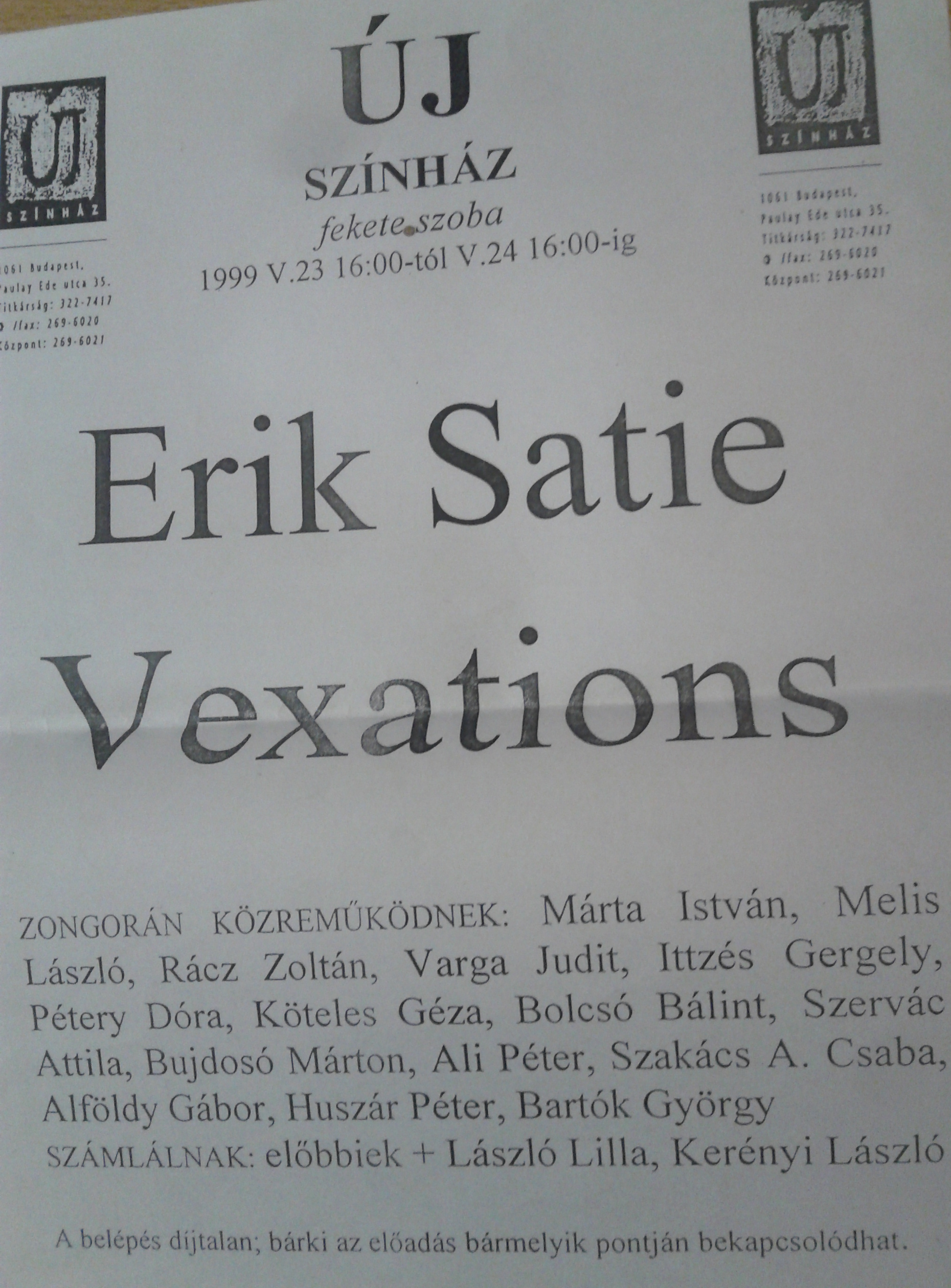 szöveges részlet a Szervác Attila otthoni technikájával készült 99-es Satie plakátból